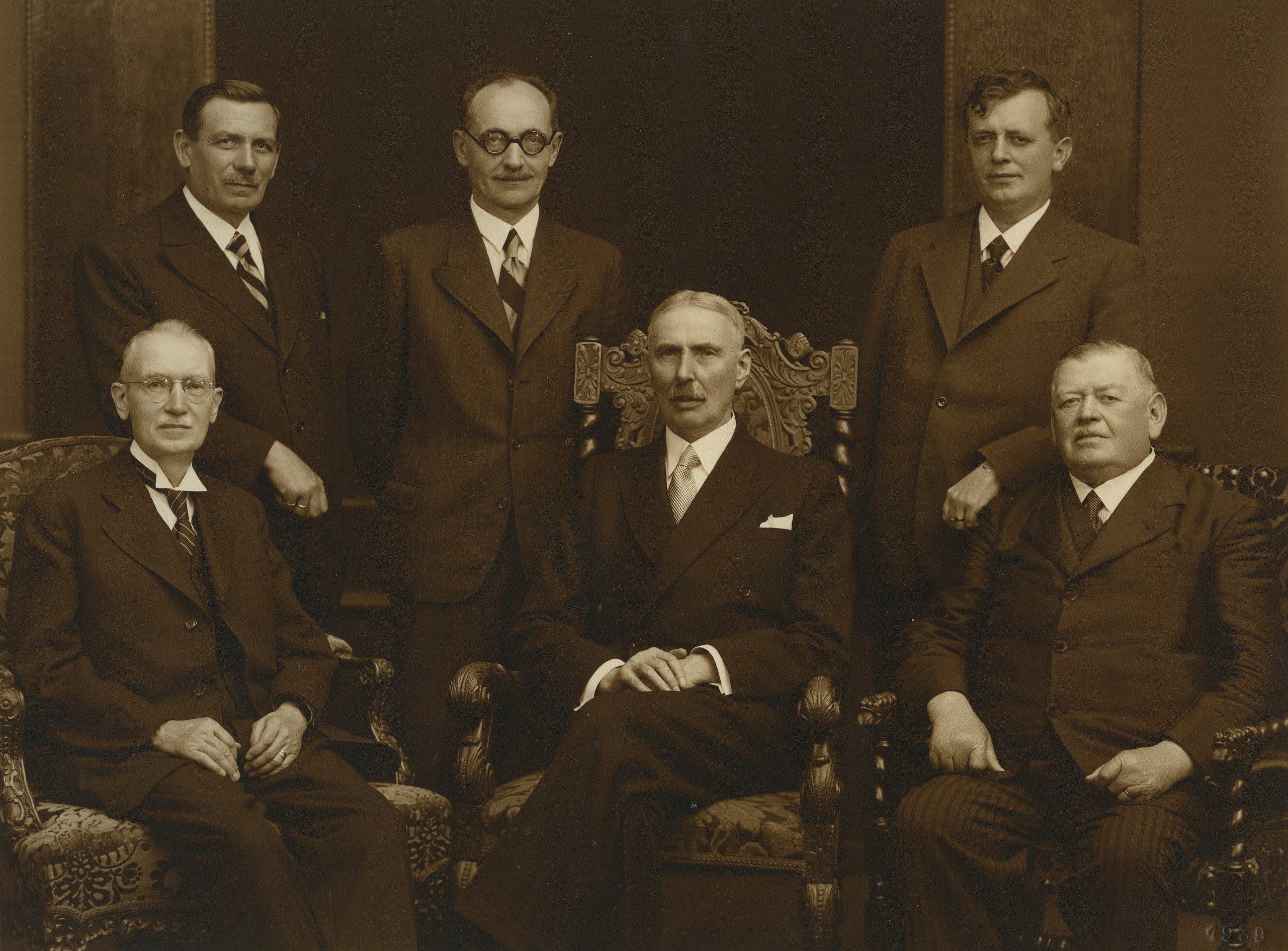 Syndoní rada před 8. synodem, 5.-7.6.1939. Sedící zleva: synodní kurátor Ferdinand Kavka, náměstek synodního seniora Kamil Nagy (vykonávající funkci po zemřelém syn. seniorovi J. Součkovi), Otmar Hrejsa, farář v Jasenné, třetí duchovenský člen SR. Stojící zleva: Antonín Boháč, laik, Bedřich Jerie, farář v Praze na Vinohradech, Jindřich Hrozný, laik